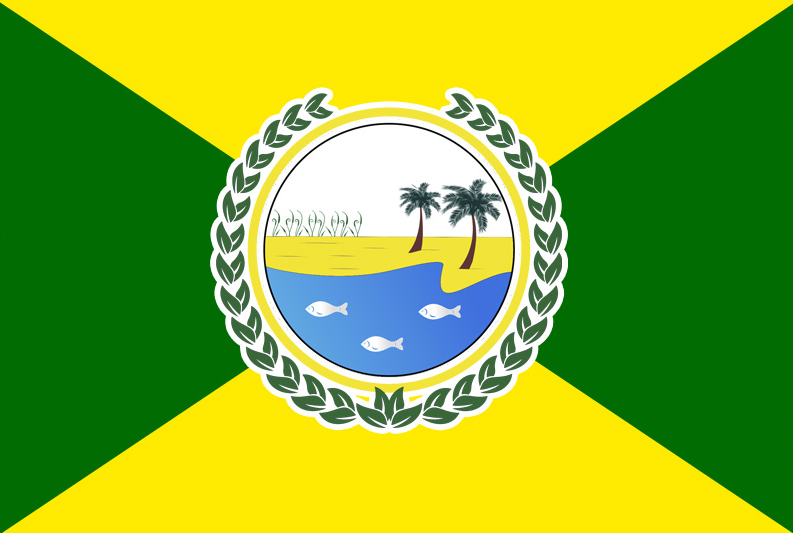 Bandeira Oficial de Piçabuçu